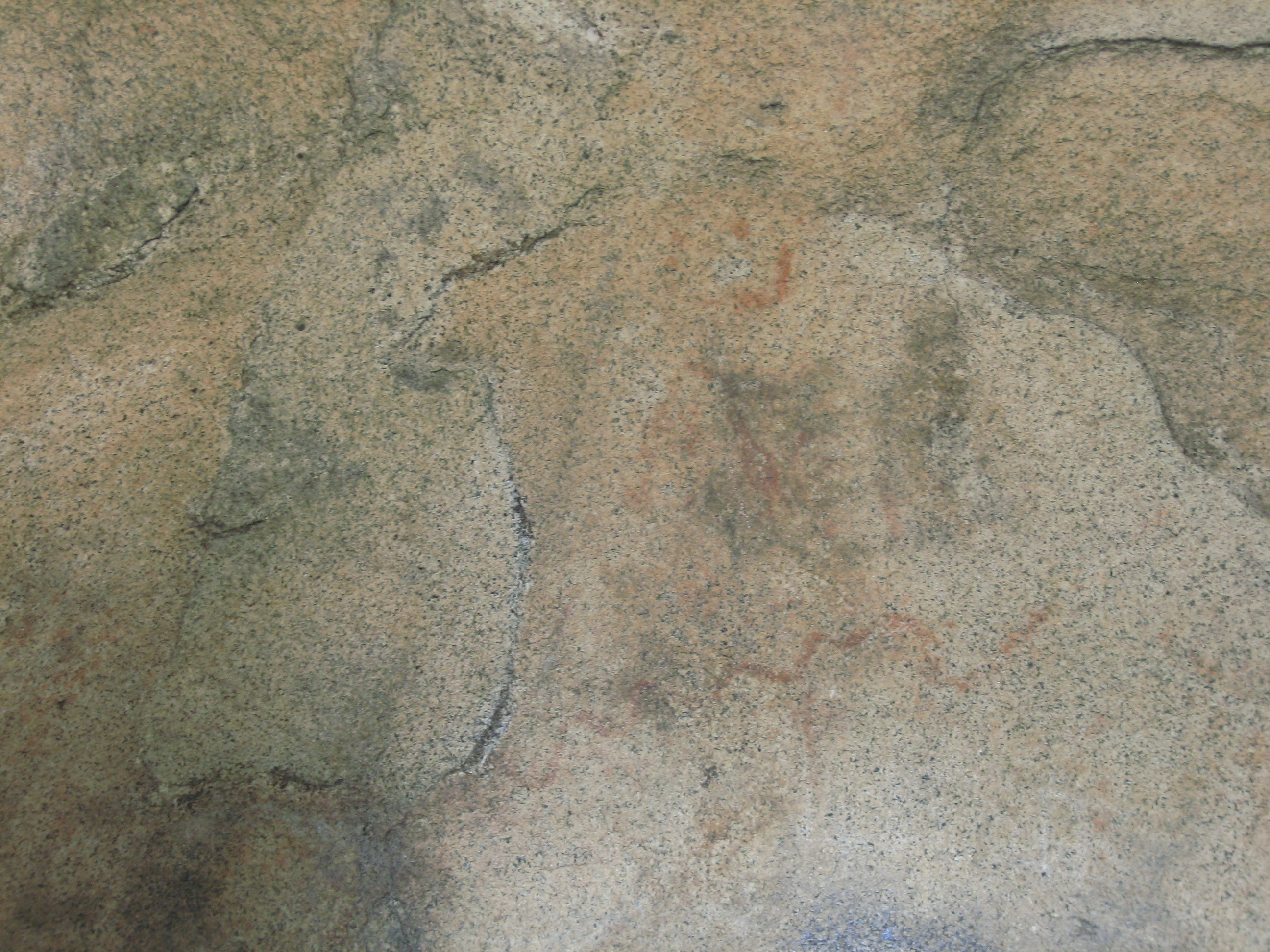 Pintures rupestres de la Pedra de les Orenetes. Célles. La Roca del Vallès.